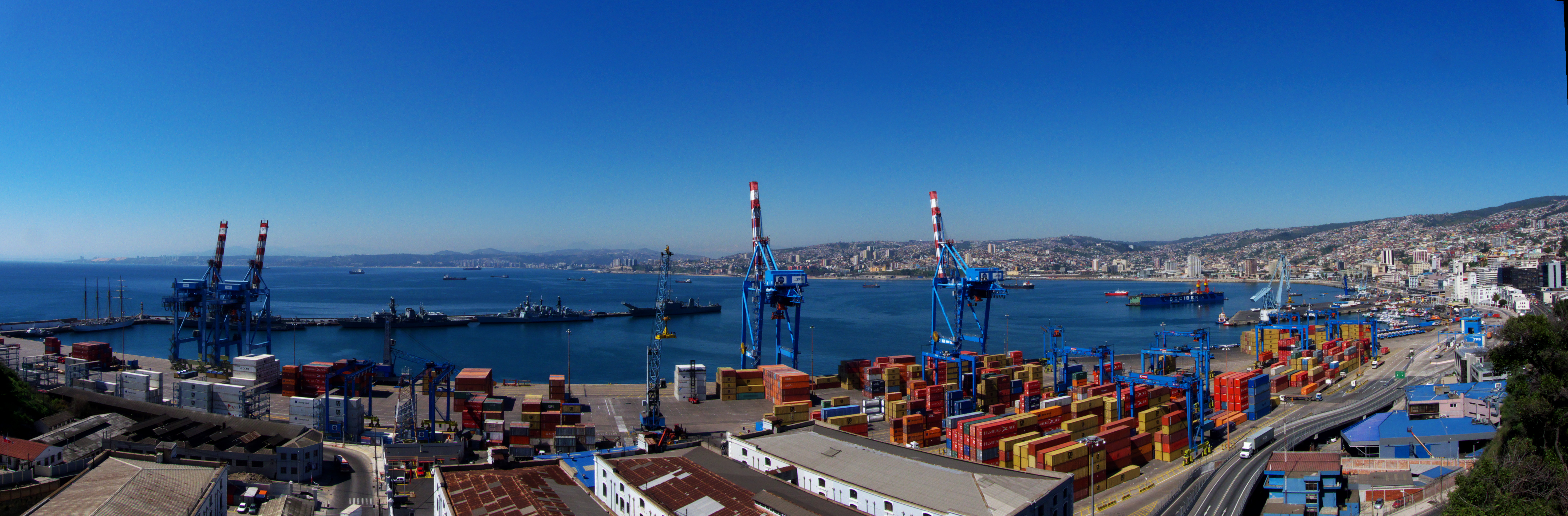 Una Típica imagen panorámica de Valparaiso, Chile.